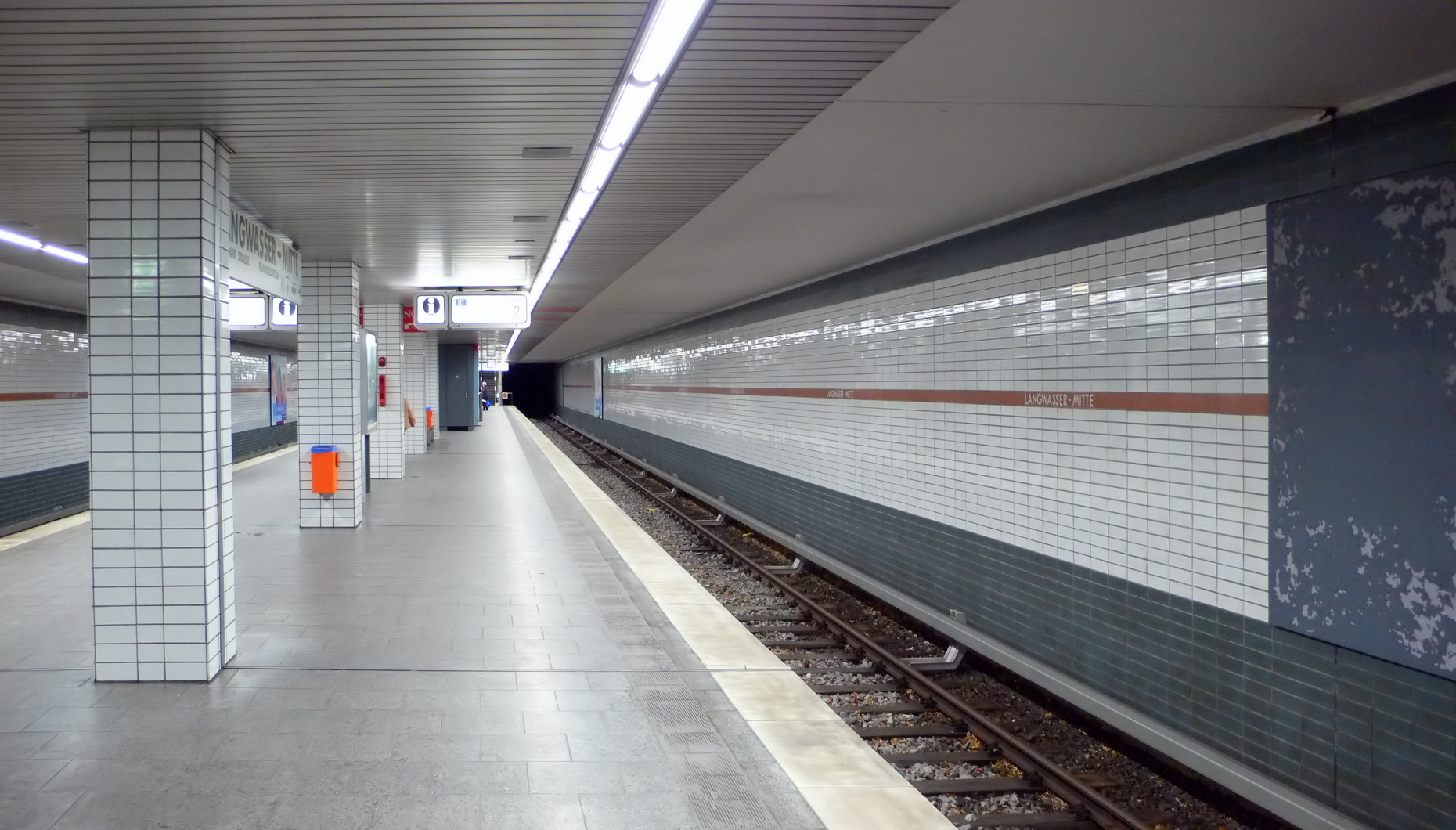 U-Bahnhof Langwasser Mitte der U-Bahn Nürnberg, Bahnsteigebene, Blick von Nordwesten